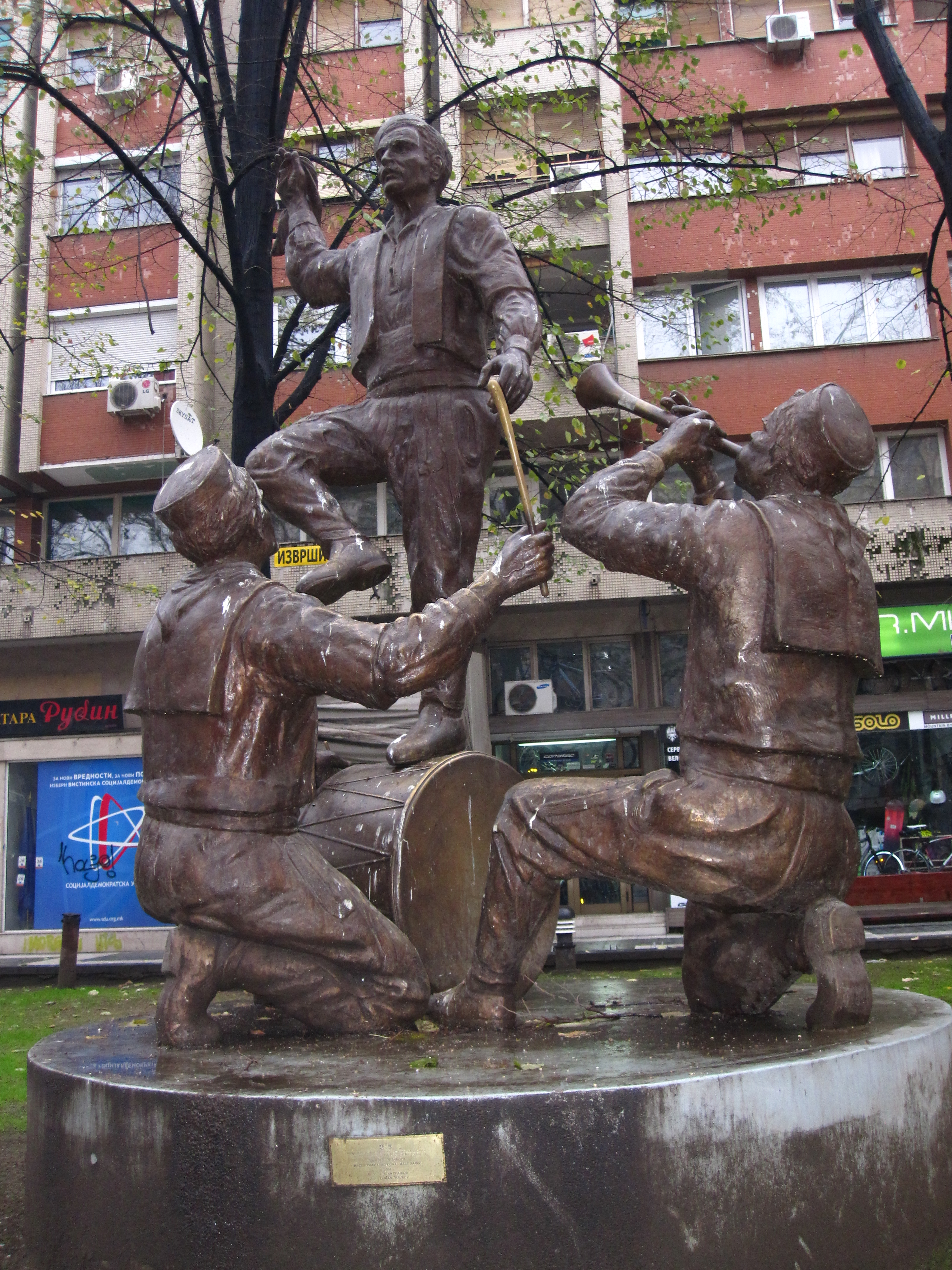 Споменик на традиционалното македонско оро Тешкото. Автор на споменикот е Златан Трајков.